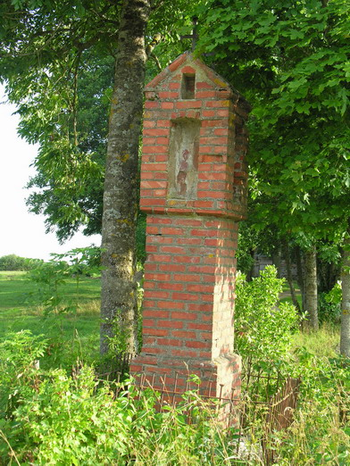 Stumbrų koplytsulpis, Mažeikių raj. Fotografavo: Algirdas, 2005 m. rugpjūčio 3 d.